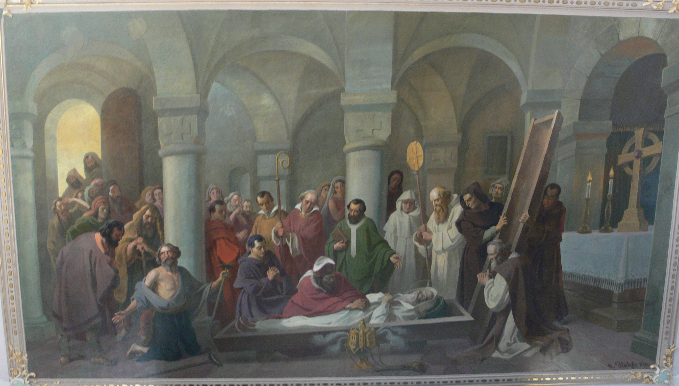 Pfarrkirche St. Gallus, Scheidegg: Gemälde über der Empore Ludwig Glötzle: "Tod des hl. Gallus" (der Bischof von Konstanz vor dem Sarg des Heiligen), 1916 vollendet